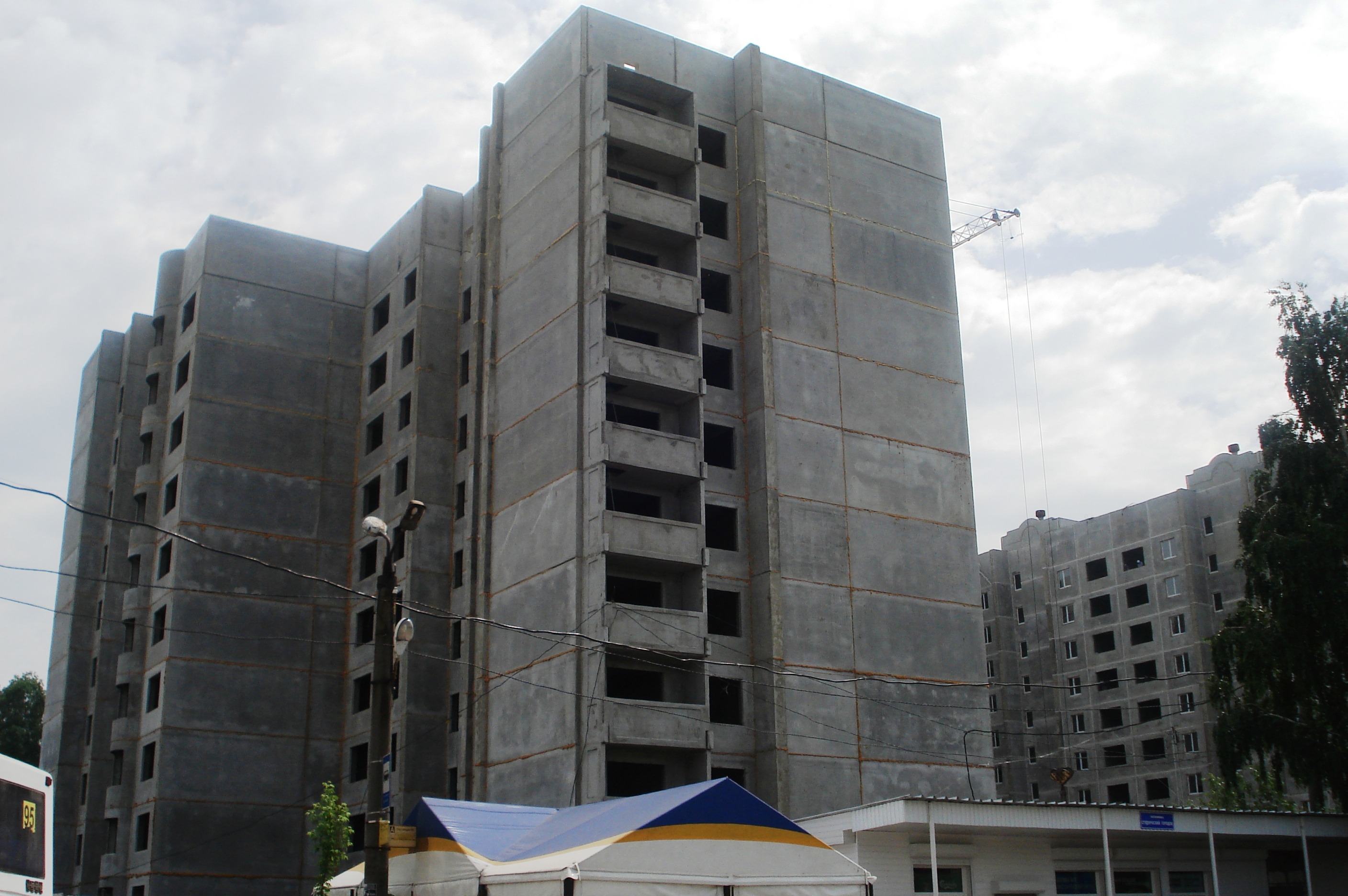 Панельное строительство на севере Воронежа